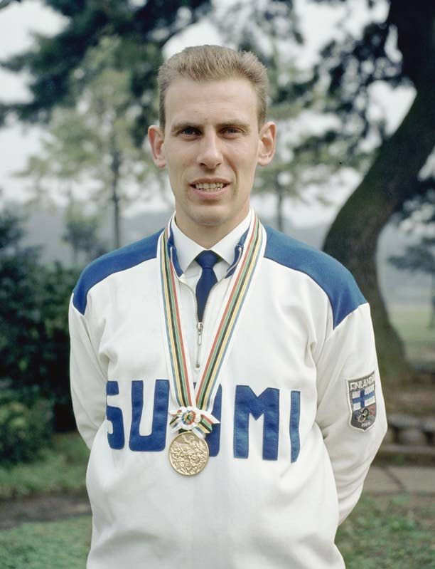 Pentti Linnosvuo